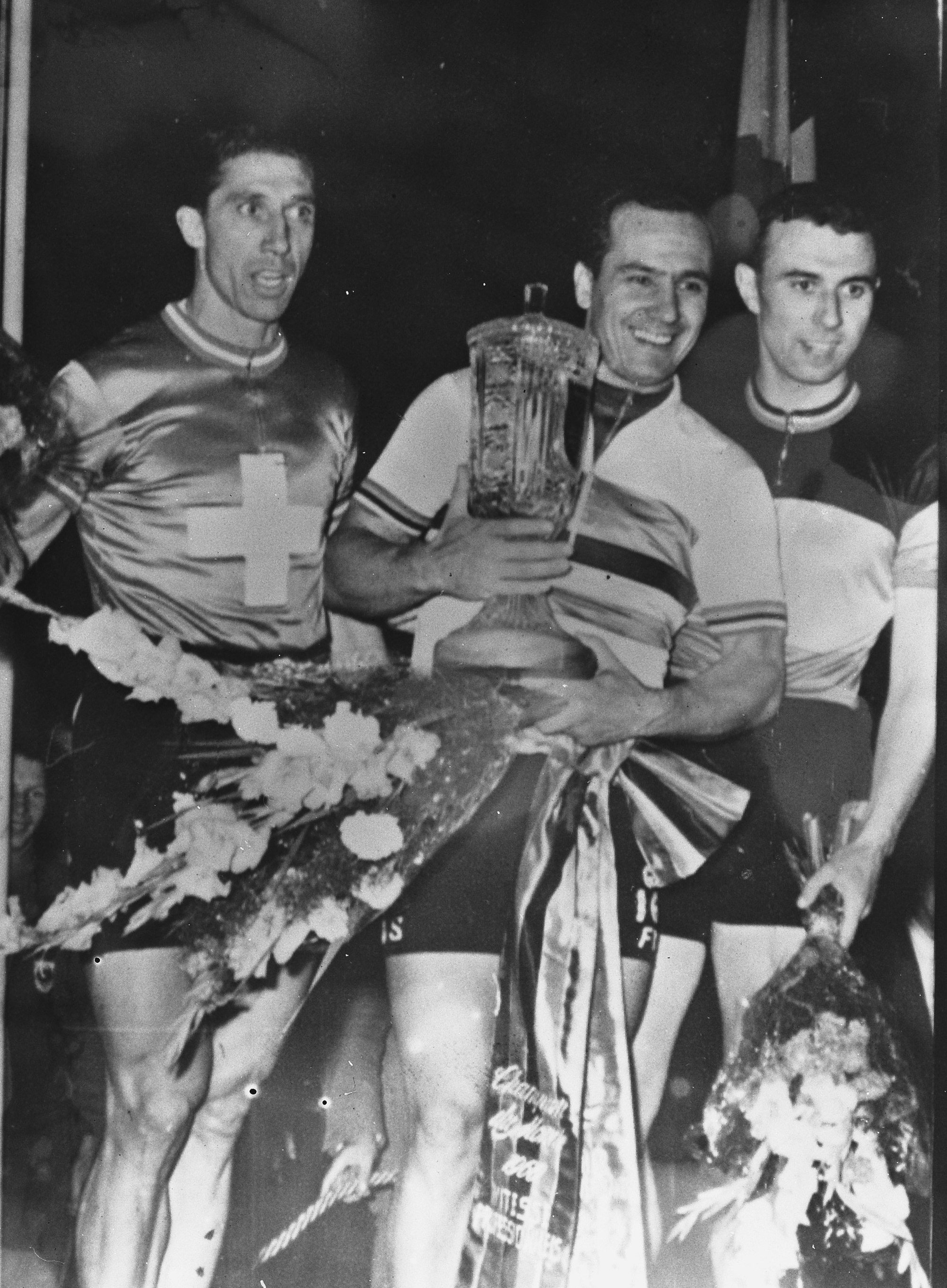 Collectie / Archief : Fotocollectie Anefo Reportage / Serie : [ onbekend ] Beschrijving : Wereldkampioenschap wielrennen te Leipzig, huldiging kampioen sprint profs v.l.n.r. Plattner, Maspes en De Backer Datum : 7 augustus 1960 Locatie : Leipzig Trefwoorden : WIELRENNERS, huldigingen, wereldkampioenschappen Persoonsnaam : Plattner, Oskar Fotograaf : Fotograaf Onbekend / Anefo Auteursrechthebbende : Nationaal Archief Materiaalsoort : Glasnegatief Nummer archiefinventaris : bekijk toegang 2.24.01.09 Bestanddeelnummer : 911-4834